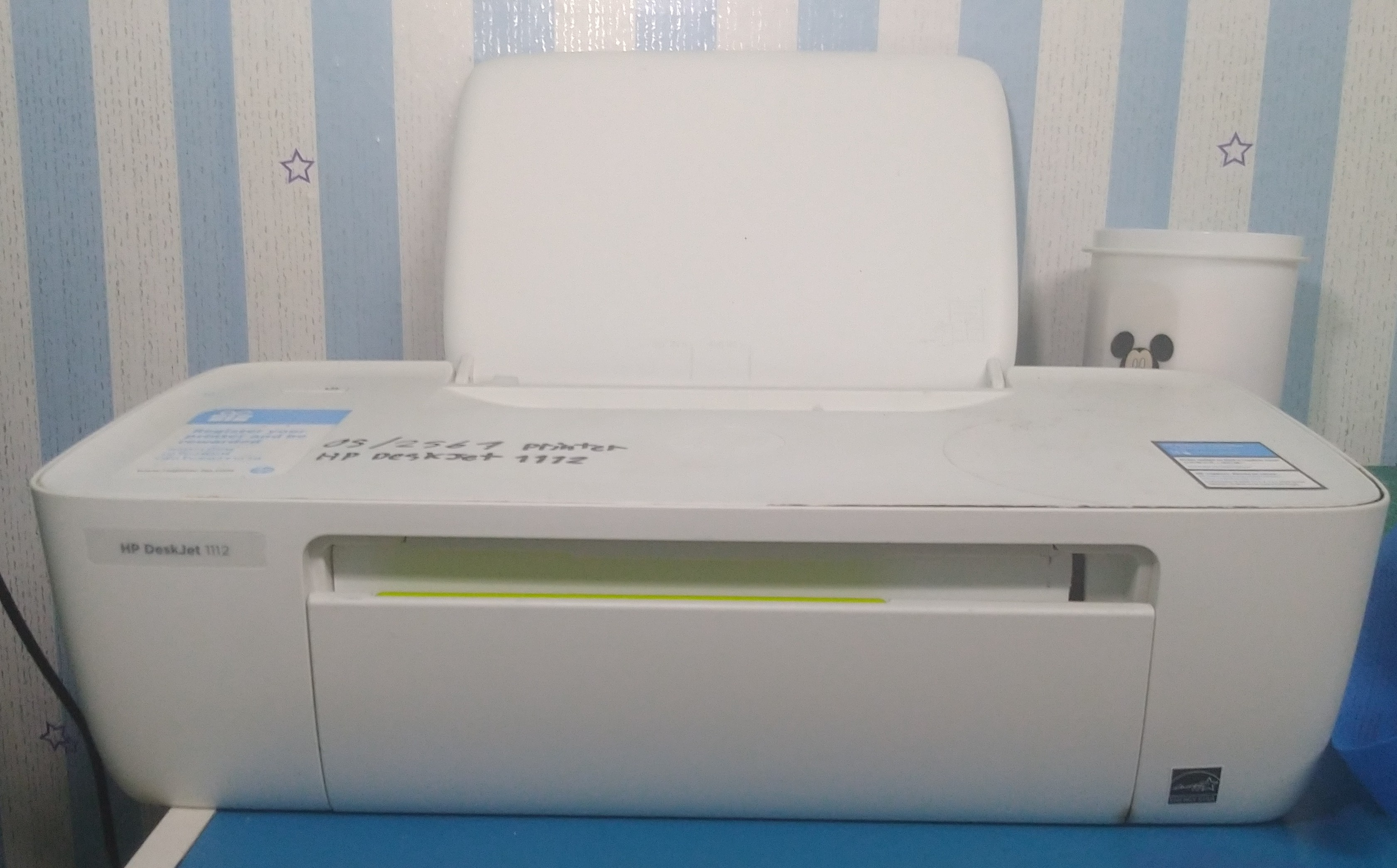 Hp 1112 printer